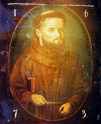 Kájoni János erdélyi születésű, román családból származó ferences szerzetes, orgonista, orgonaépítő, énekszerző és -fordító.